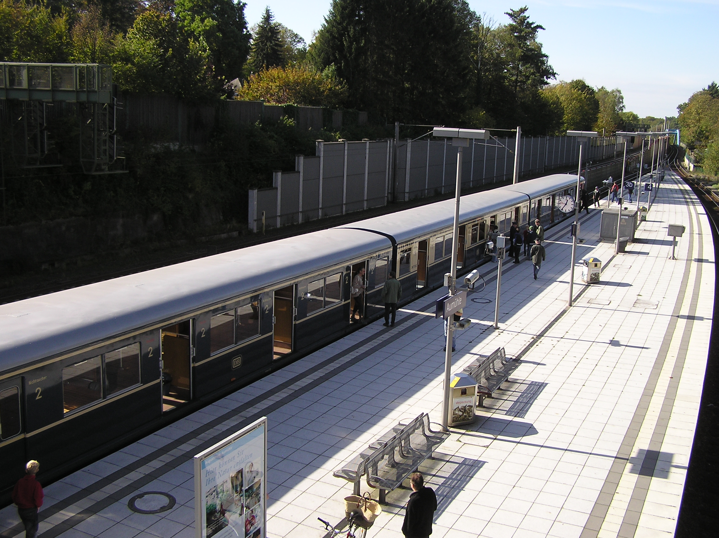 DRG Baureihe ET 171: ET171082 im Bahnhof Aumühle